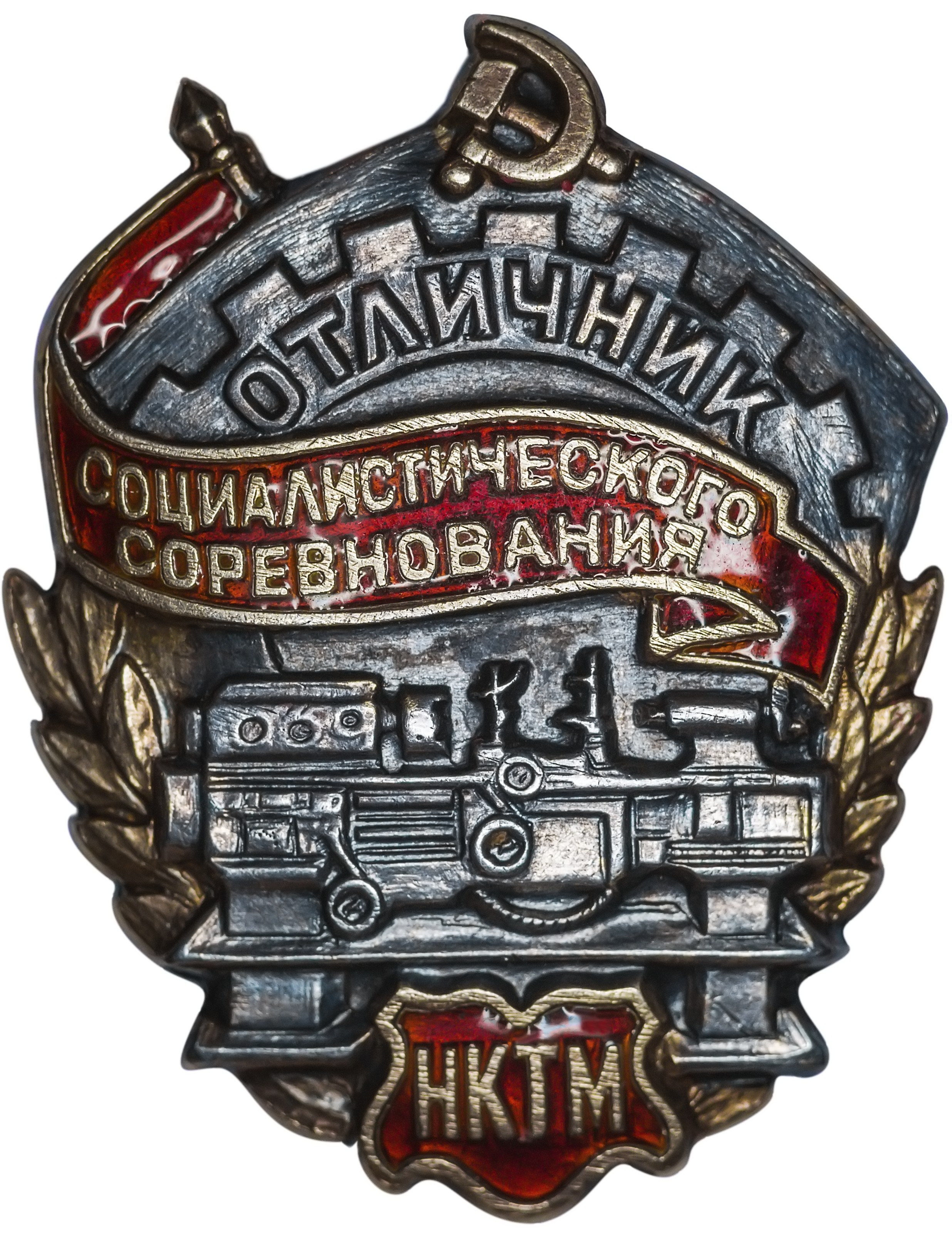 Знак «Отличник социалистического соревнования Наркомата тяжелого машиностроения». Серебро, позолота, эмаль. Размер 31,1×24,2 мм. Вес 8,22 г.